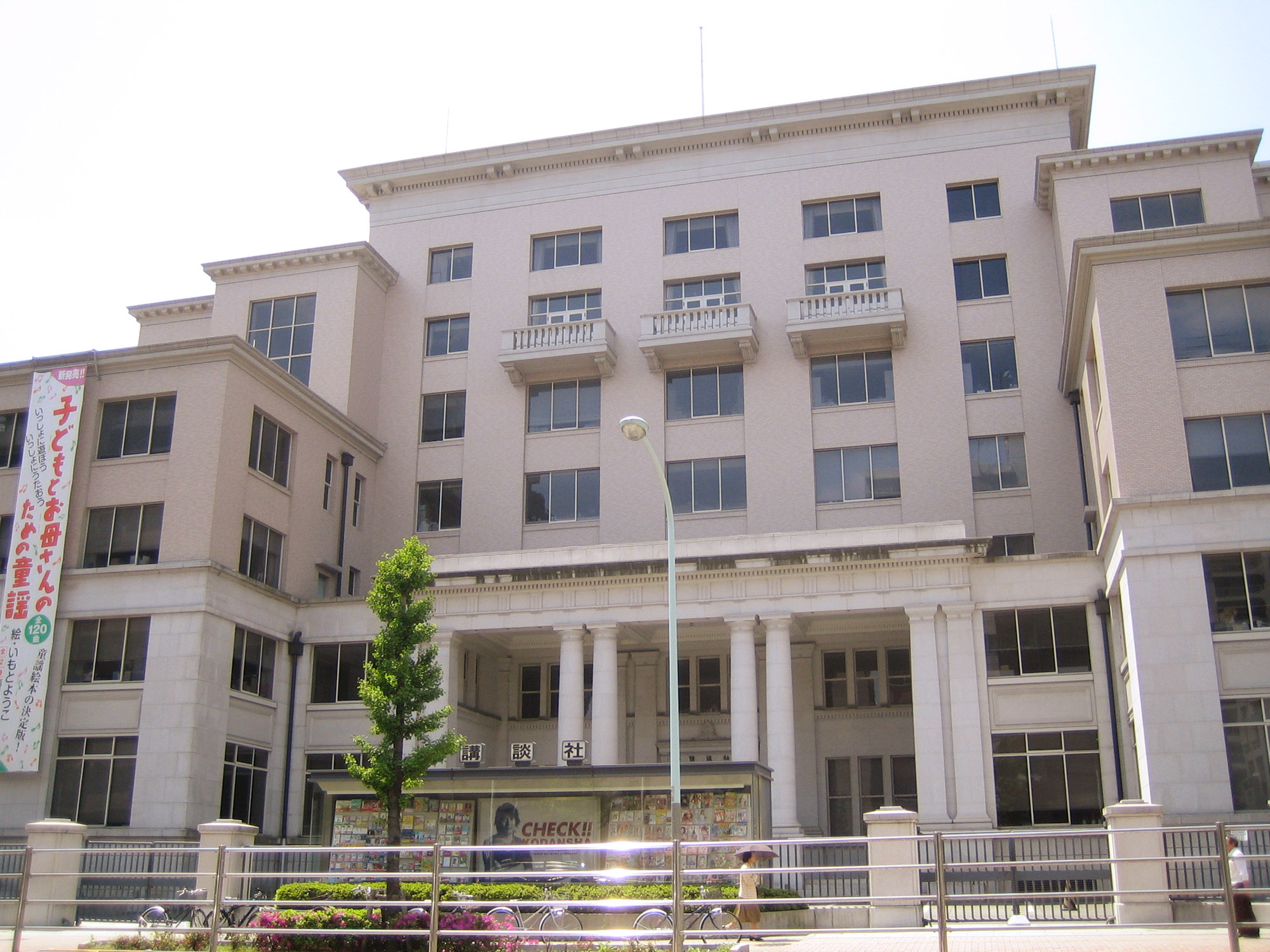 Kodansha (講談社), in Bunkyo, Tokyo, Japan